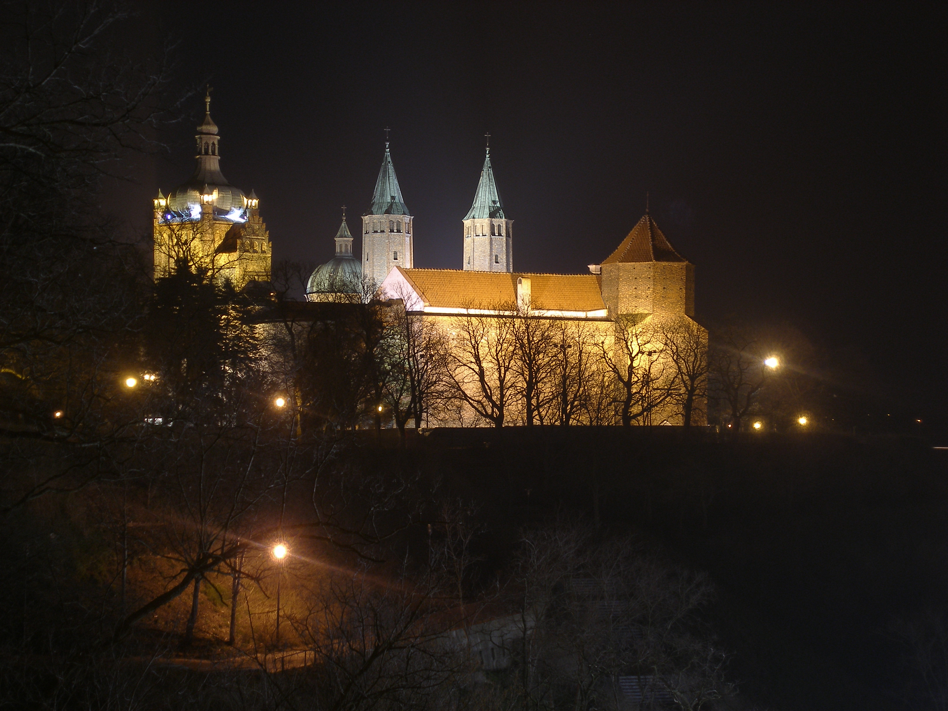 Płock - Wzórze Tumskie nocą